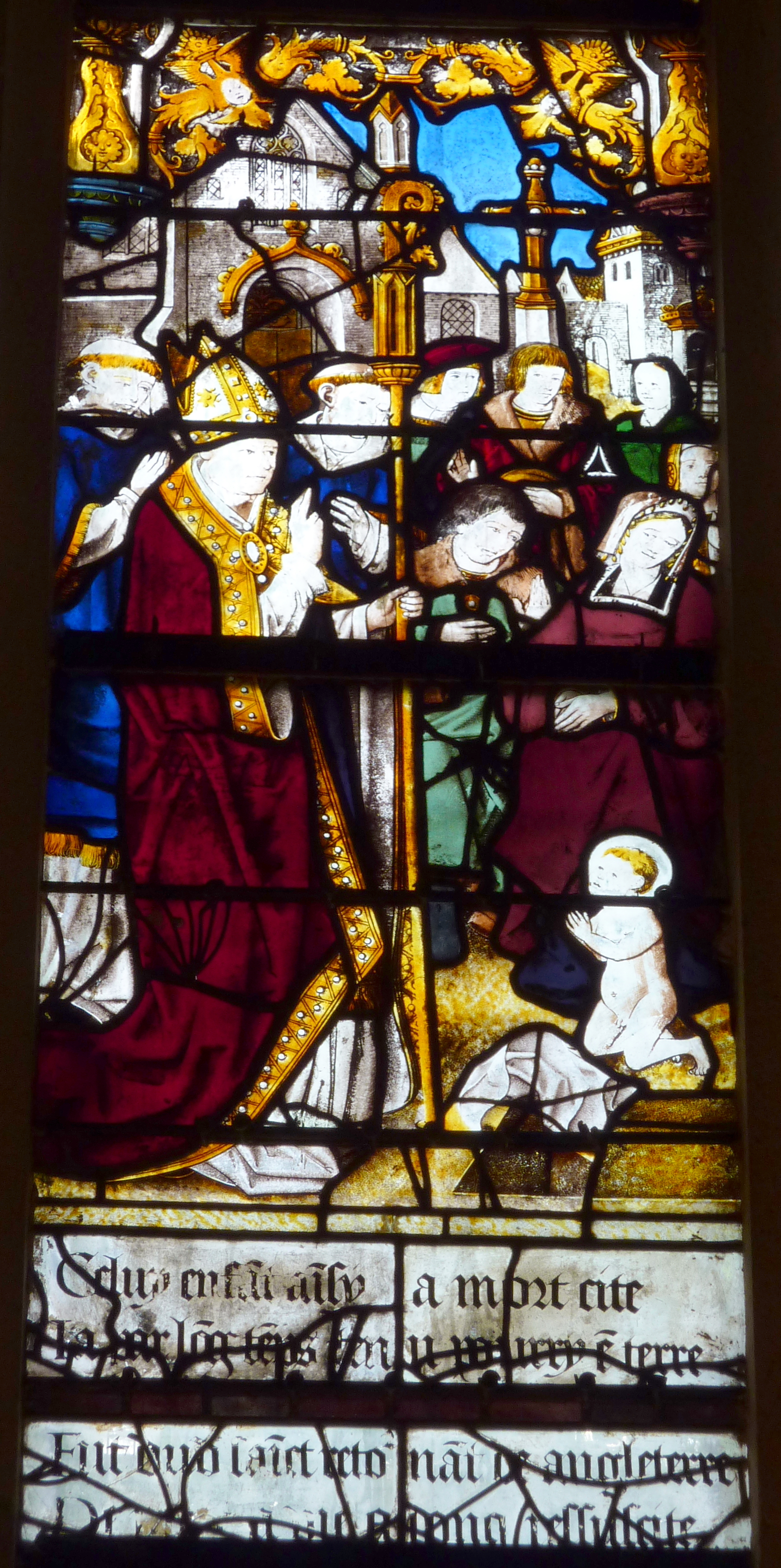 Bleiglasfenster (Ausschnitt) in der katholischen Kirche Notre-Dame-de-Pitié in Puteaux